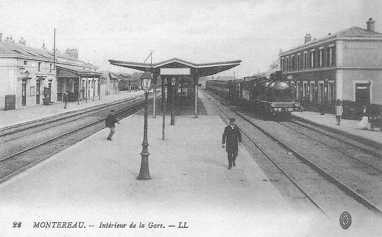 Gare de Montereaut (Seine-et-Marne, France), au début du XX° siècle.